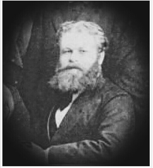 Фото 1871-1874 гг. Иван Степанович среди членов Самарского окружного суда.